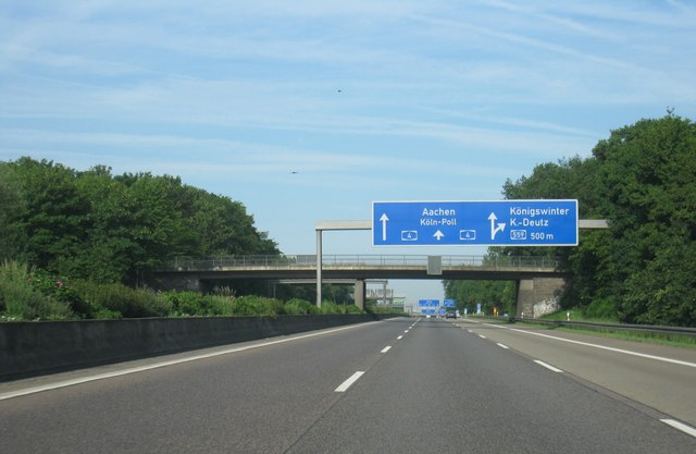 A4 bei Ostheim